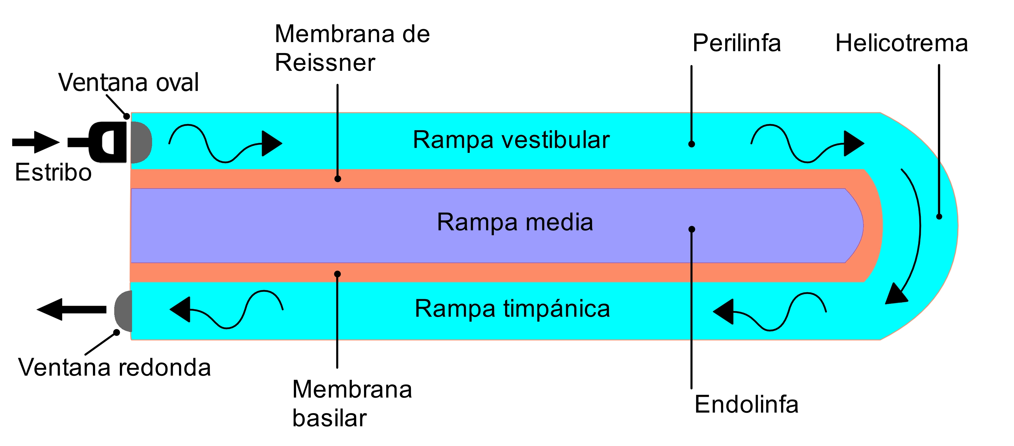 Esquema en el que se muestra el aspecto longitudinal de la cóclea, la rampa vestibular, media y timpánica, asi como la localización del helicotrema.